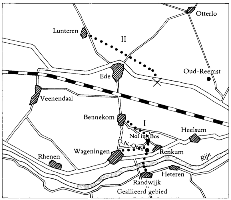 Pegasus I en Pegasus II. Voor Pegasus I werd verzameld bij Nol in ’t Bos en de daar bijeengekomen groep volgde in de nacht van 22 op 23 oktober '44 van Oranje Nassau-Oord een pad naar de uiterwaarden waar zij de Rijn kon oversteken. Voor Pegasus II werd verzameld in Lunteren. De bedoeling was dat de daar gevormde groep in twee nachtelijke marsen de Rijn zou bereiken bij Heteren. Zij kwam in de nacht van 16 op 17 november in goede orde bij een punt, iets benoorden de straatweg Arnhem—Ede—Amsterdam, maar raakte verstrooid toen zij in de daaropvolgende nacht die straatweg trachtte te passeren.